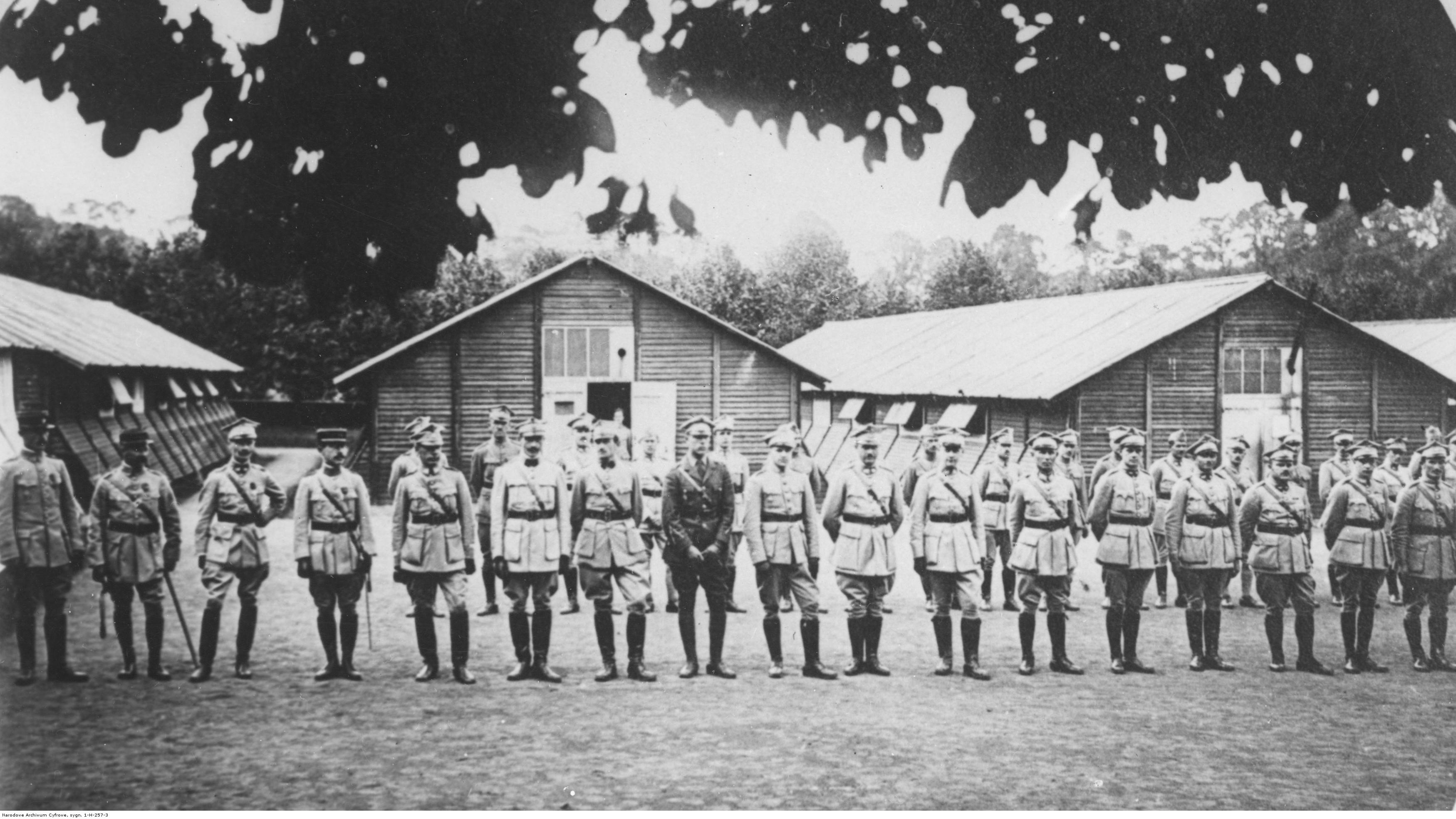 Armia Polska we Francji - ośrodek wyszkolenia w Quintin. Przegląd szkoły podoficerskiej; 1918 r. Koncern Ilustrowany Kurier Codzienny - Archiwum Ilustracji. Sygnatura: 1-H-257-3